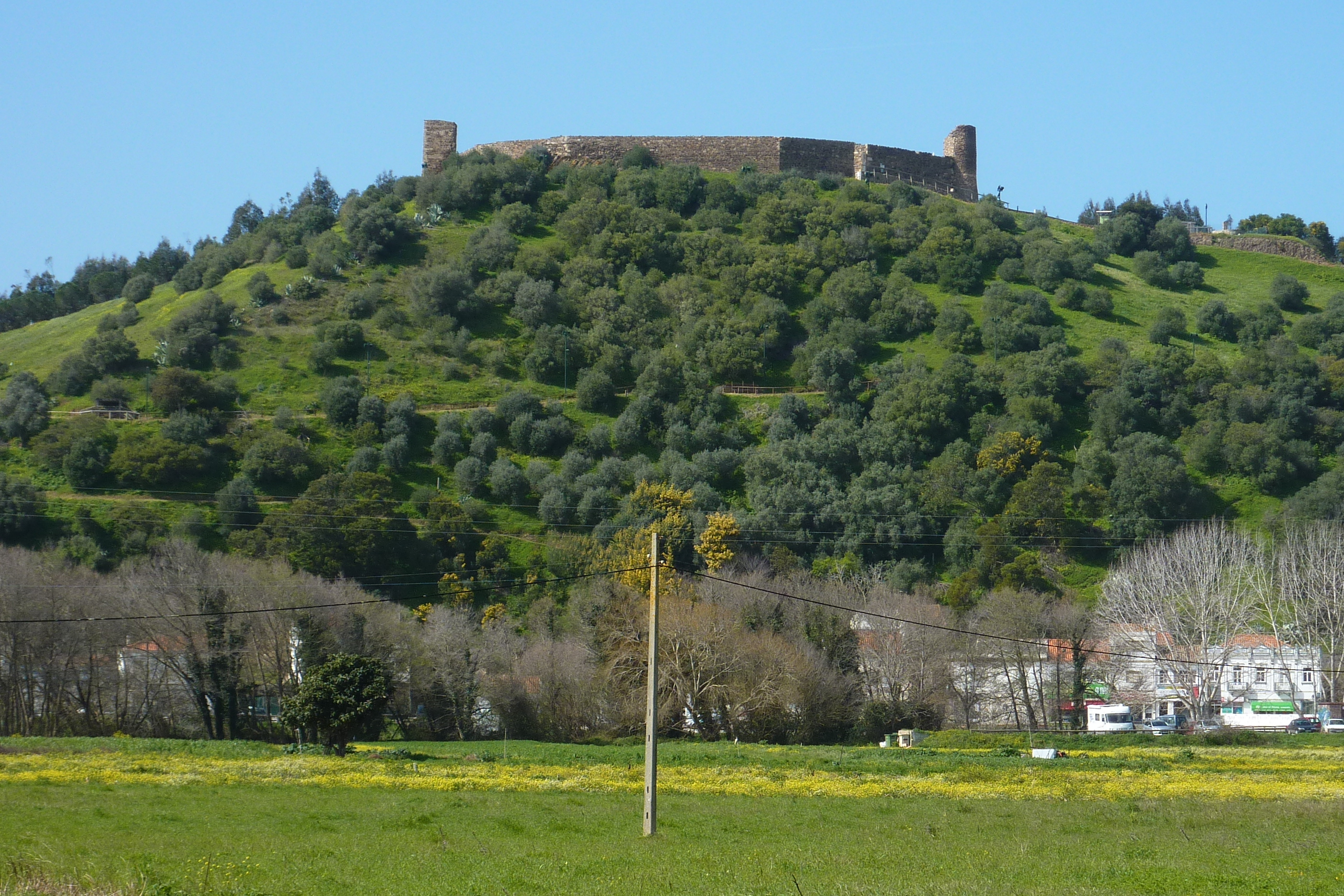 Aljezur - castle